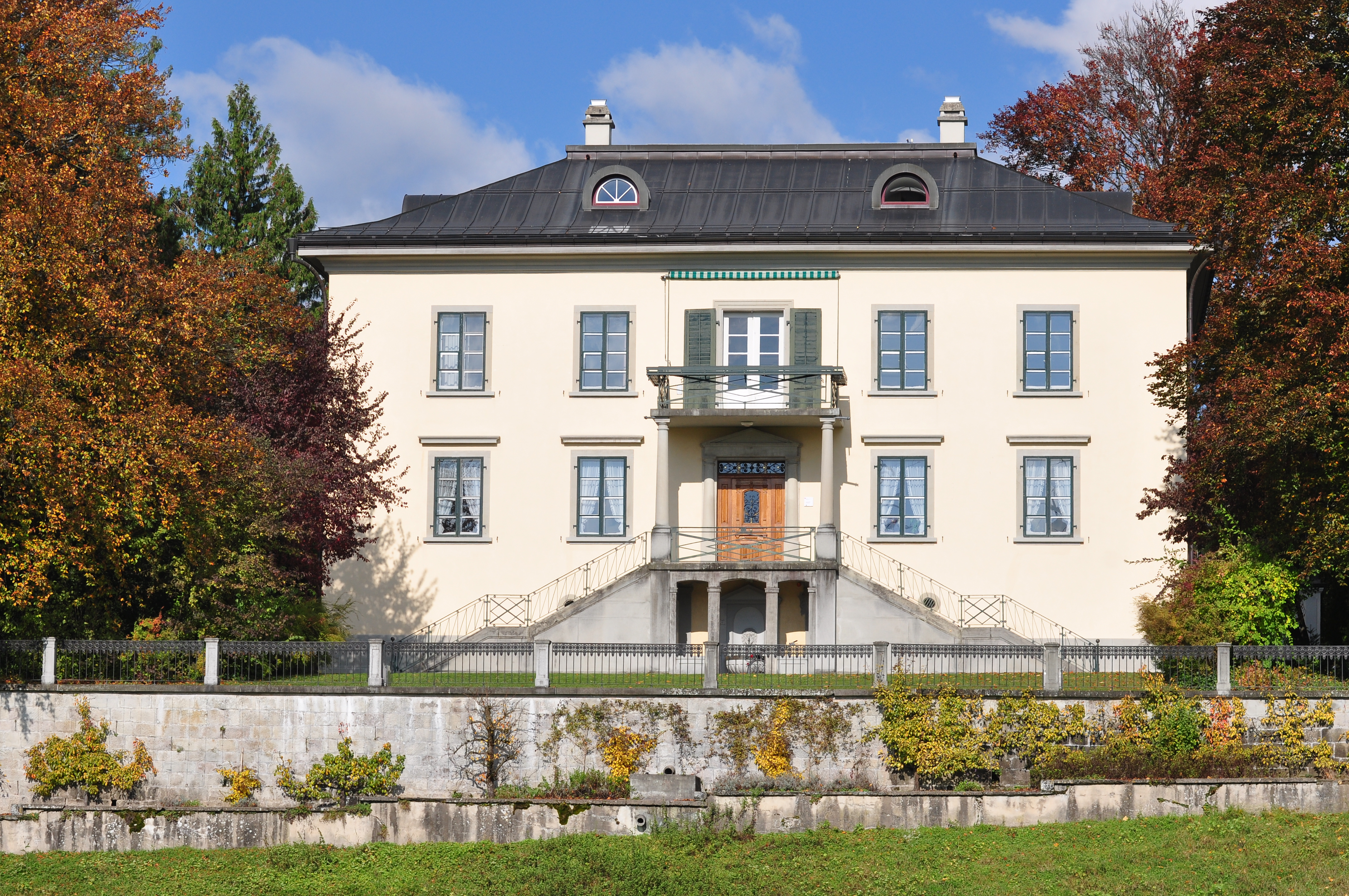 Villa Grünfels in Jona (Switzerland)